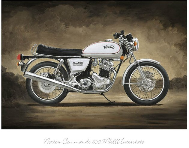 moto norton 850 comando